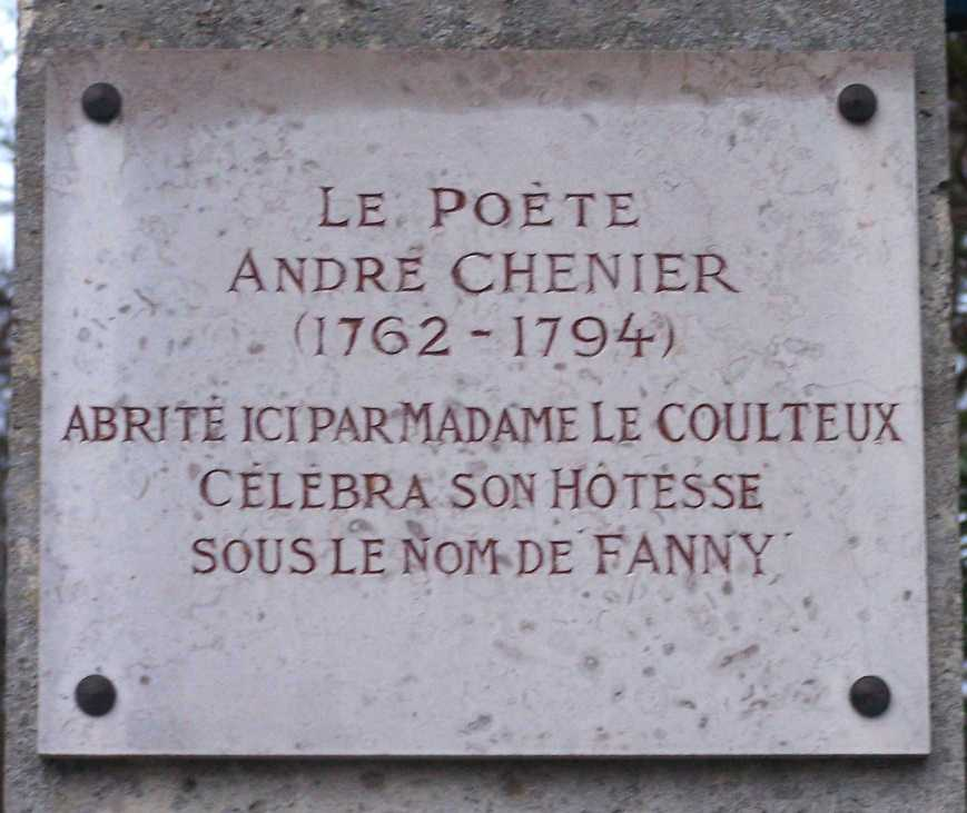 Plaque commémorative d'André Chénier à Voisins, commune de Louveciennes (Yvelines, France)